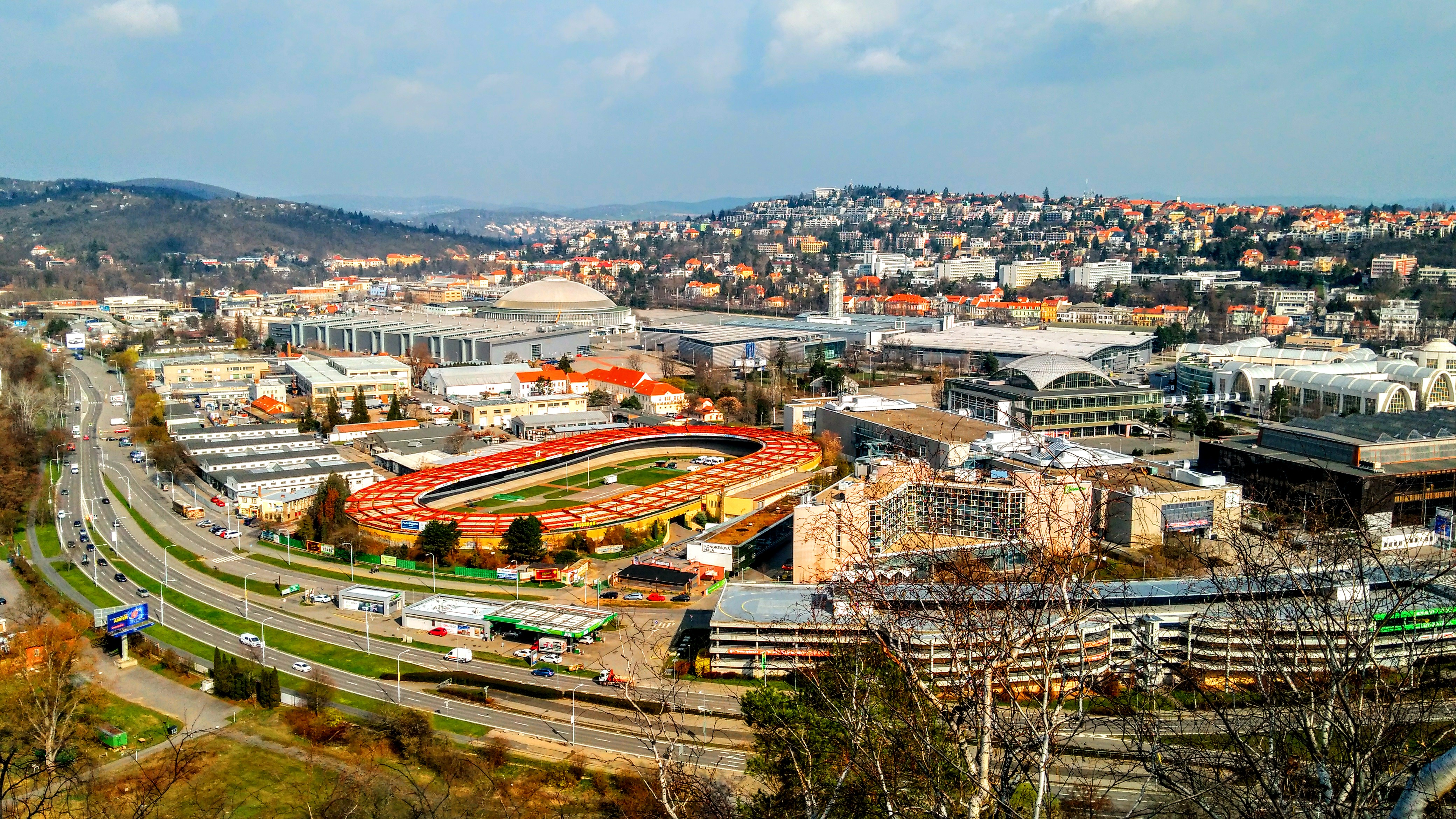 Brněnské výstaviště a čtvrť Pisárky z Mahenovy stráně.